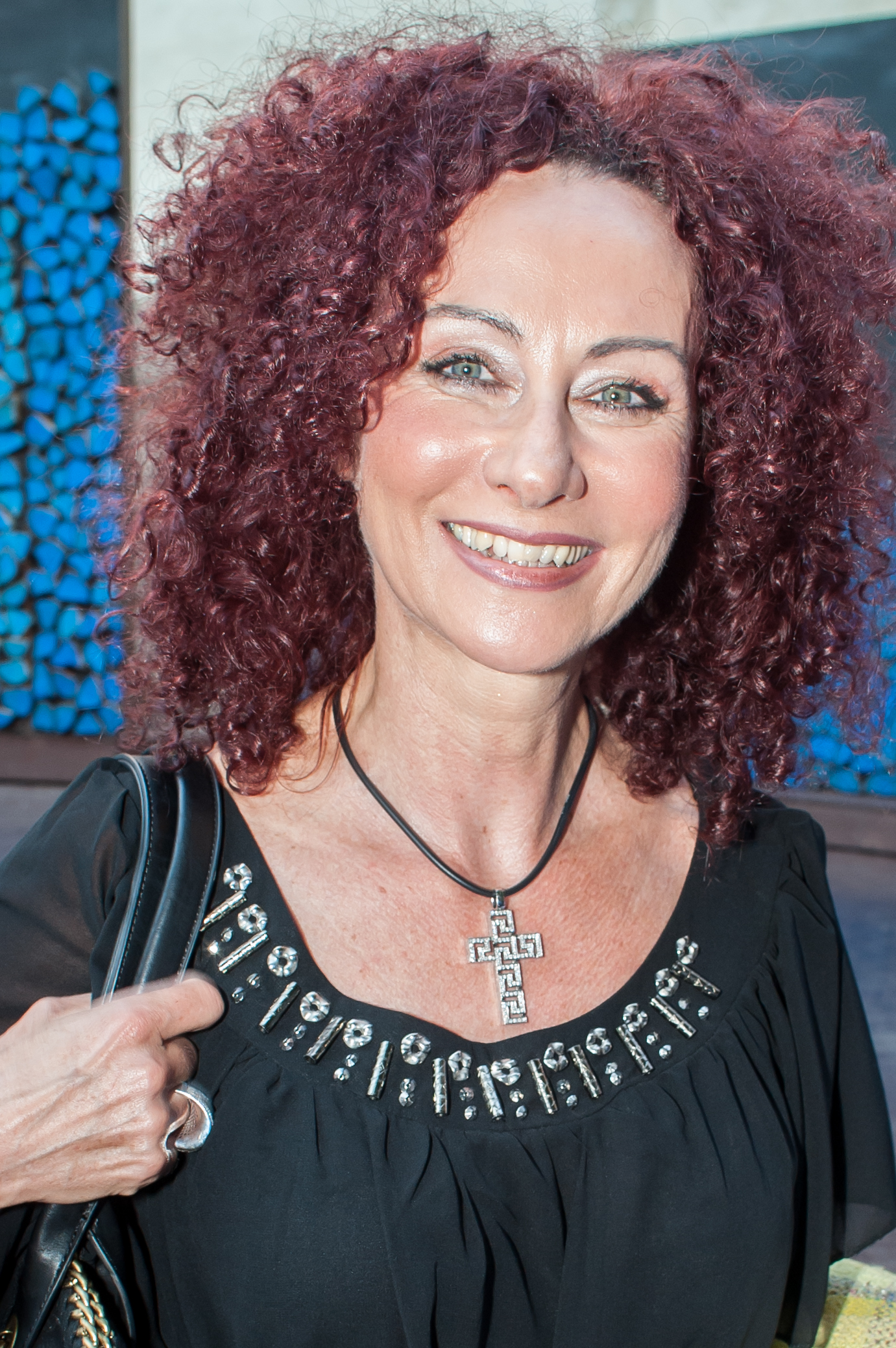 Wachaufestspiele Weißenkirchen: Premiere von „Der Brandner Kaspar und das ewig’ Leben“ am 19. Juli 2016 in Weißenkirchen. Bild zeigt Christina Lugner.